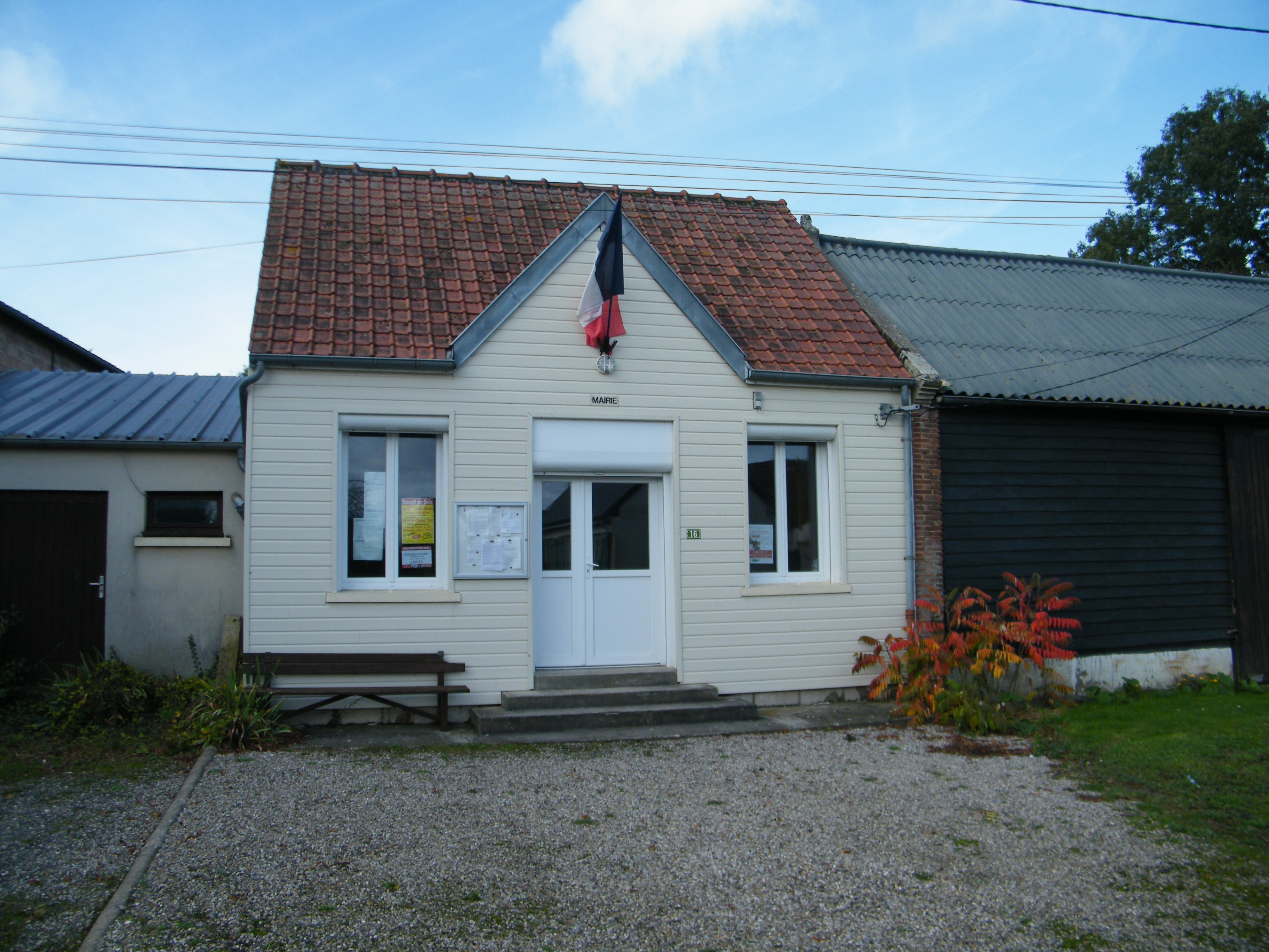 Mairie.